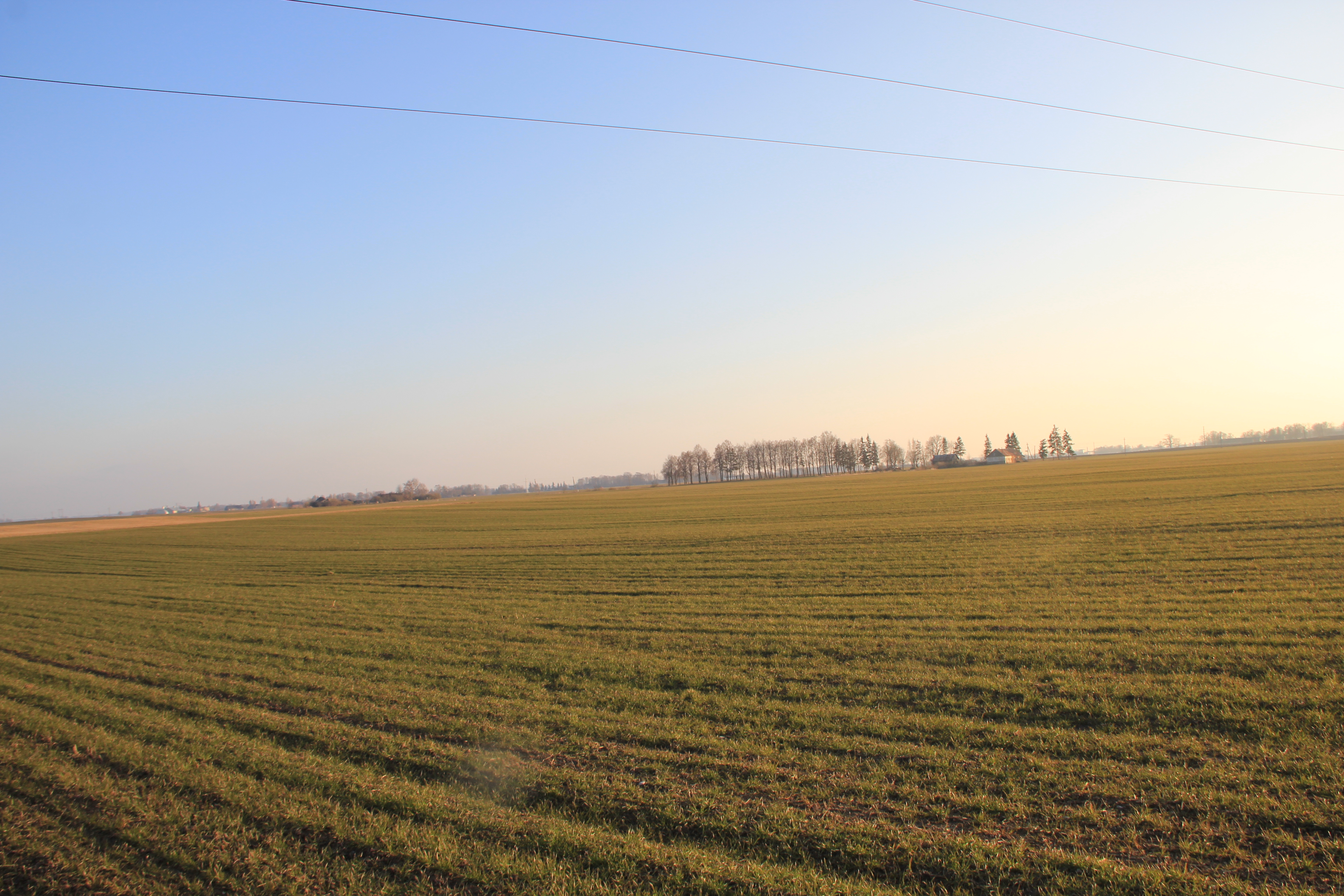 Goesų valdos 2016 m.